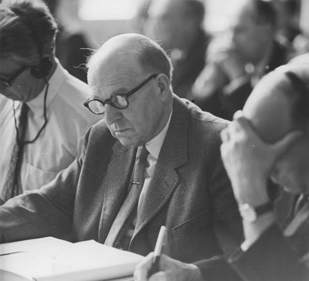 Oberstes Gericht, Globke-Prozess, Pitt Zentralbild Brüggmann Stöhr-8.7.1963 Globke-Prozess eröffnet. Vor dem 1. Strafsenat des Obersten Gerichts der DDR begann am 8. Juli 1963 der von der internationalen Öffentlichkeit mit großer Spannung erwartete Prozess gegen den langjährigen leitenden Mitarbeiter des faschistischen Reichsinnenministeriums und derzeitigen Bonner Staatssekretär Dr. Hans Globke. UBz: Unter den Prozessbeobachtern, Kronanwalt D. N. Pritt (England).